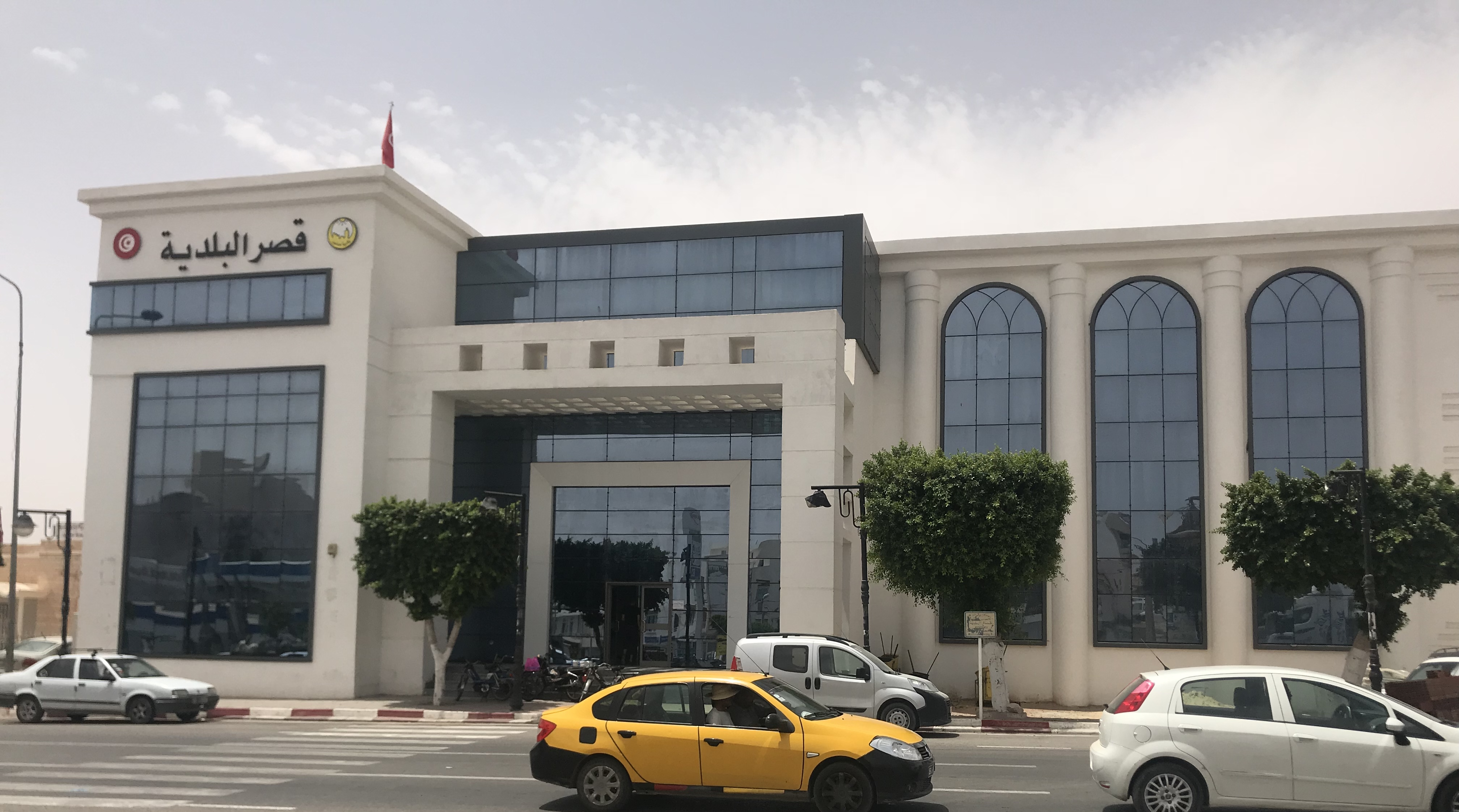 Hôtel de ville de Médenine, 23 juillet 2018.